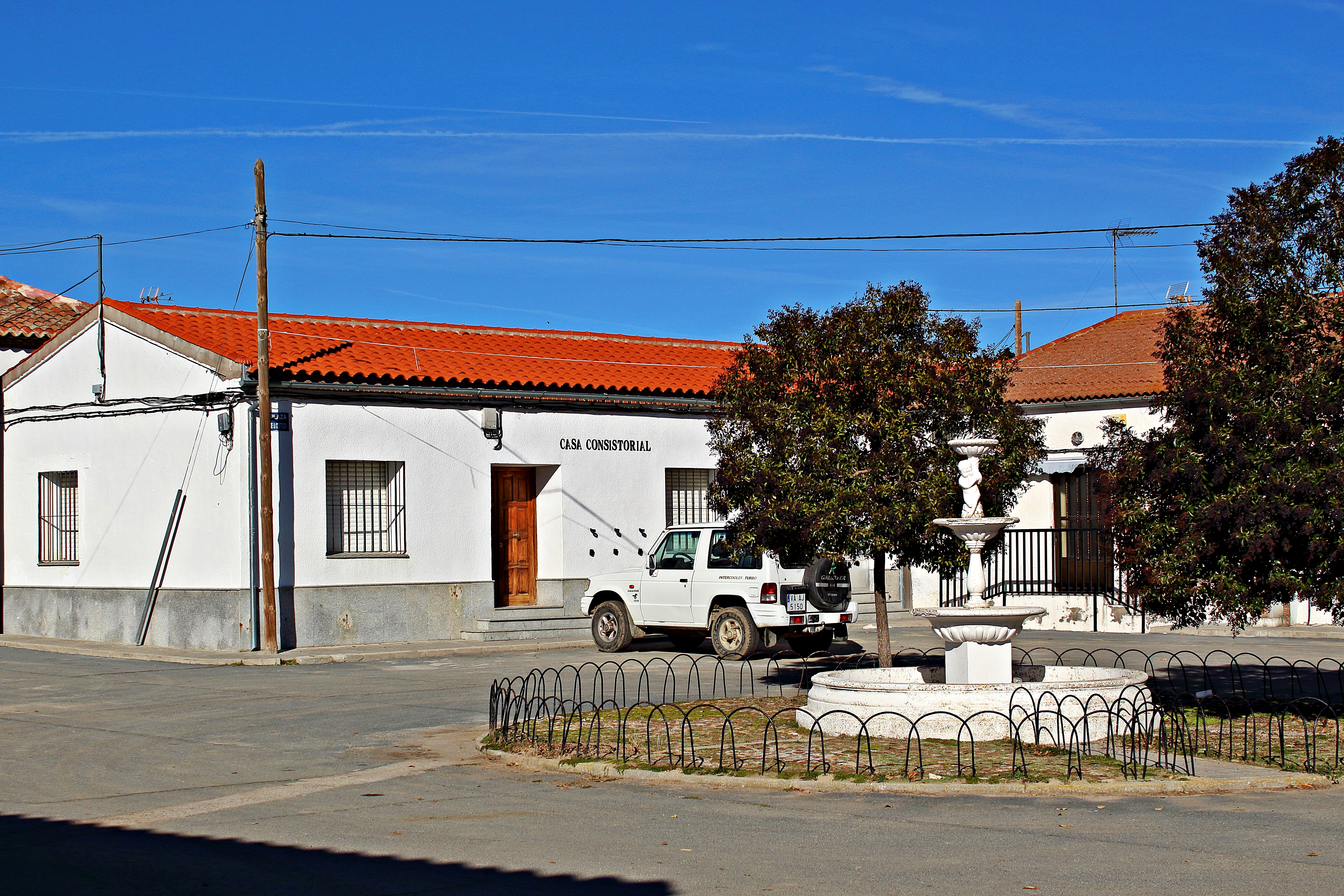 Cabezas del Pozo, municipio de la comarca de La Moraña, en la provincia de Ávila.